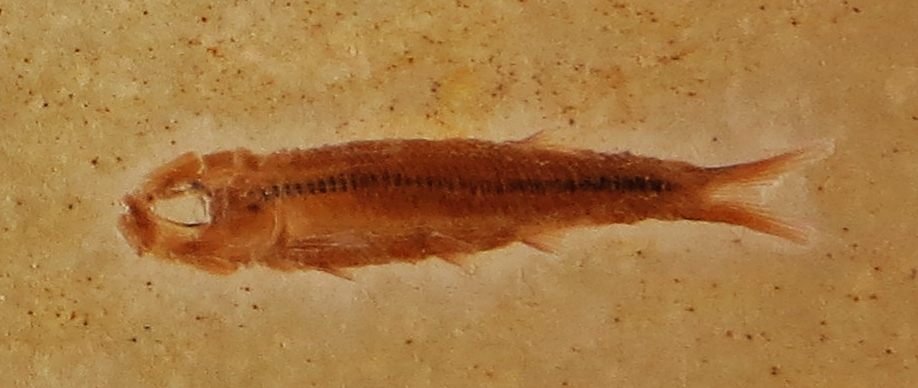 Took the picture at Jura-Museum, Eichstaett